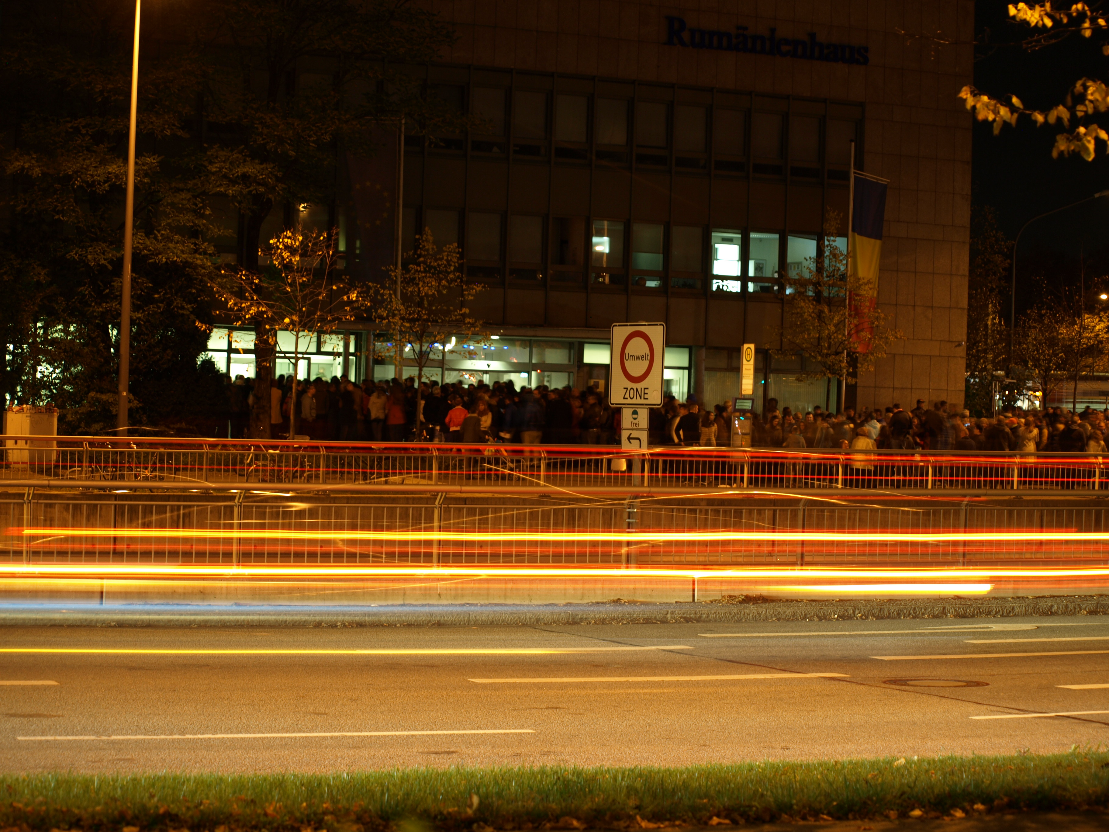 Vot și proteste la München 2 noiembrie 2014 Dan Mihai Pitea